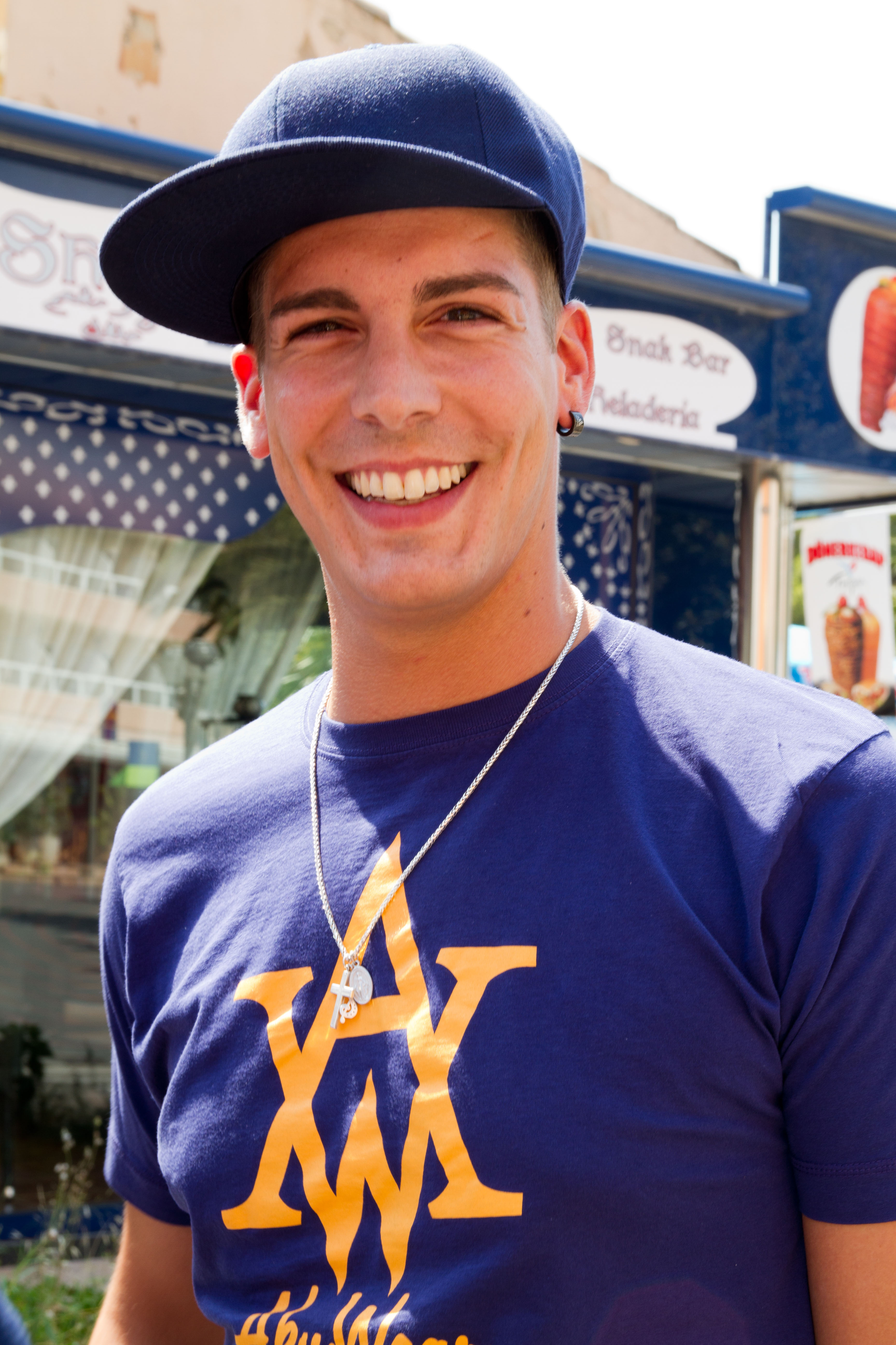 Norman Langen bei Dreharbeiten für RTL2 im Kultbistro "König von Mallorca" auf Mallorca